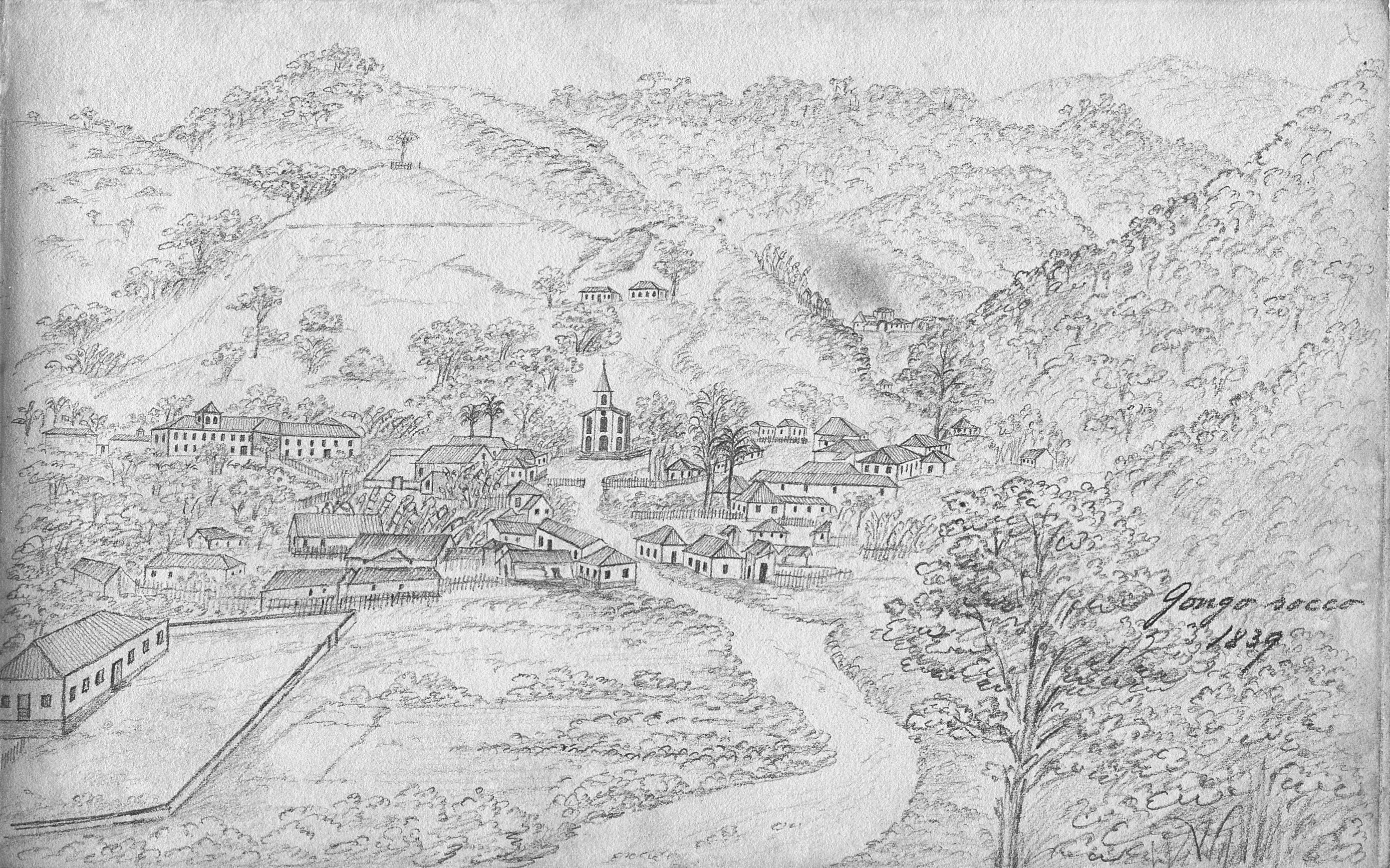 Vila de Gongo-Soco; desenho a lápis por Ernst Hasenclever durante sua visita à mina; caderno de desenho, 1839